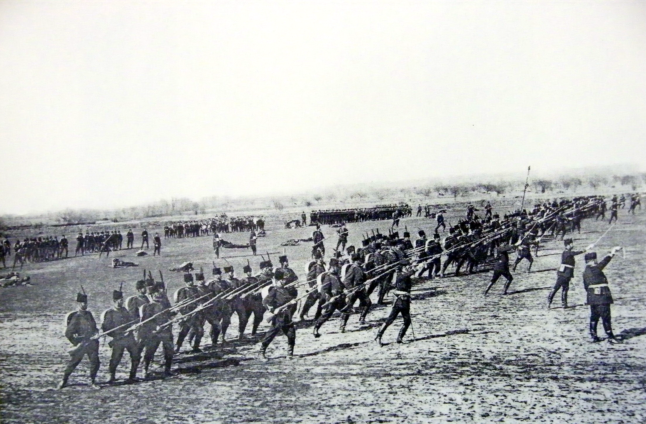 Fotografie a Regimentului Teleorman nr. 20, 1902, România